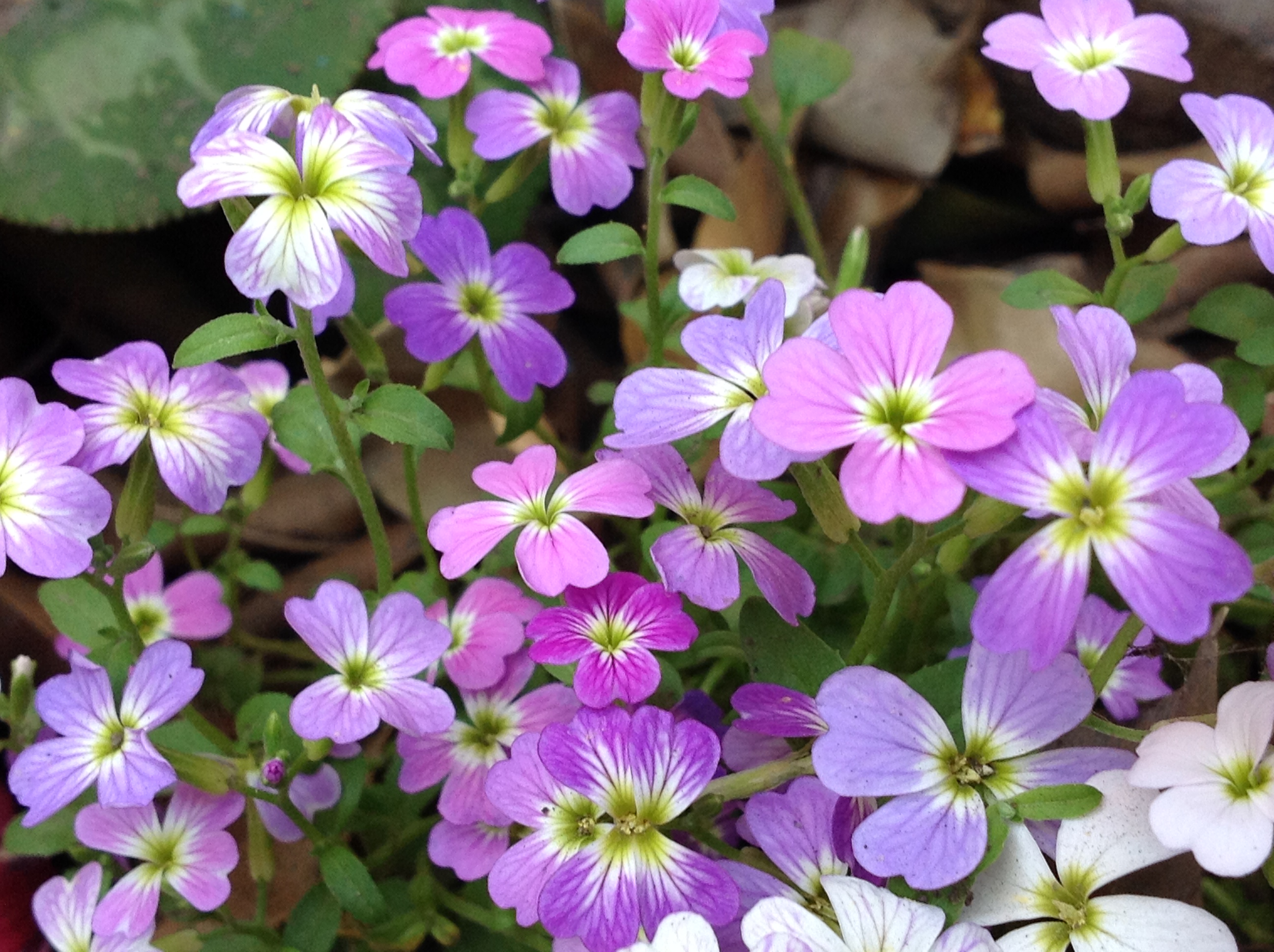 Flores de Aleli de Mahon en nuestra huerta organica.